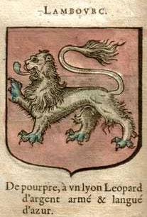 Lambourg